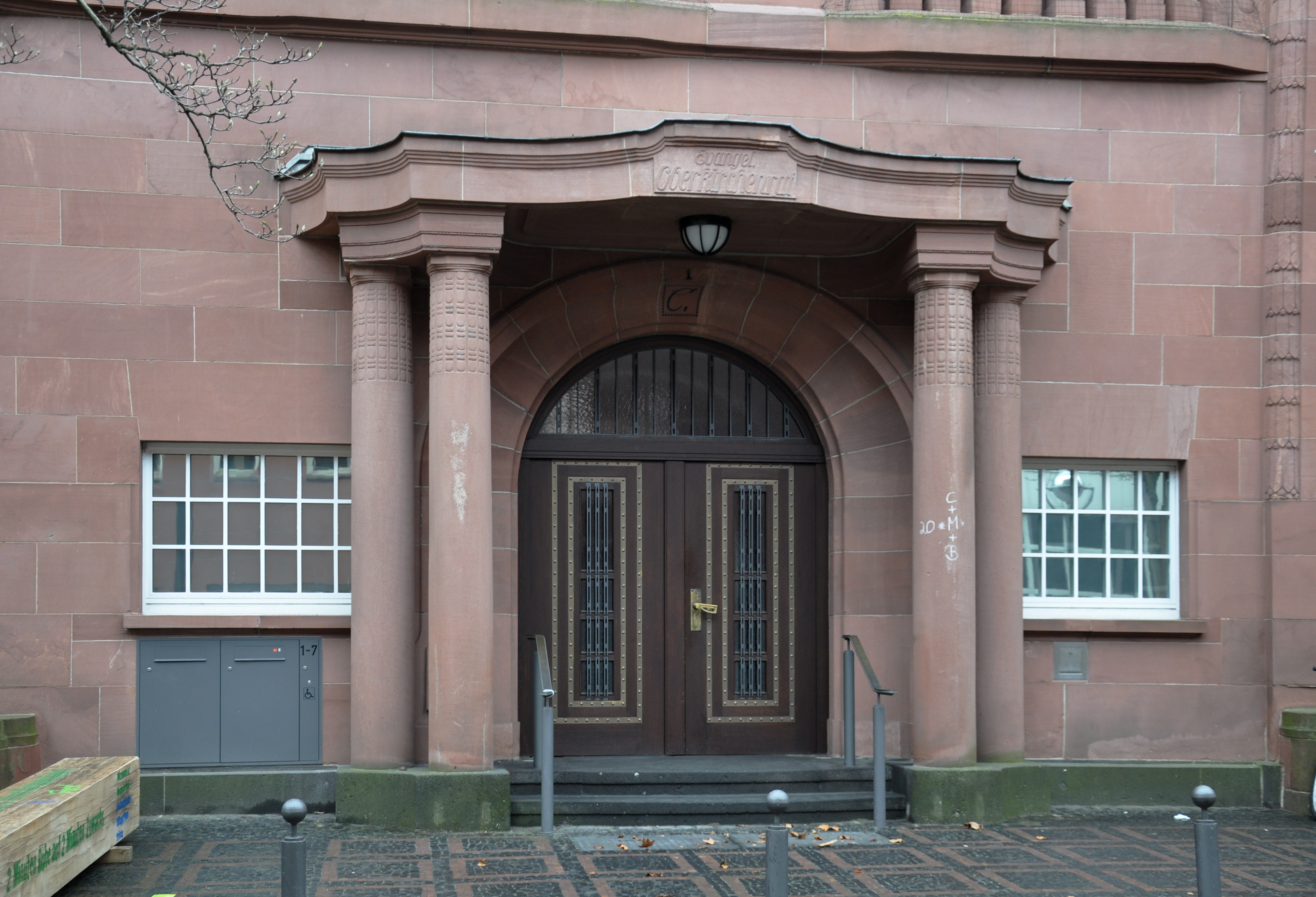 Karlsruhe, Oberkirchenrat der Evangelischen Landeskirche in Baden, Eingang